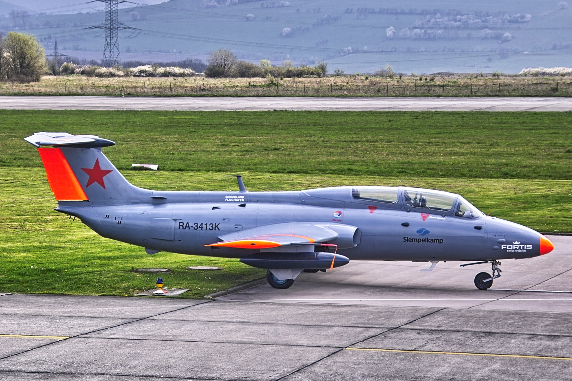 L-29 Delfin jet-propelled trainer aircraft, shot at Flugplatzfest 2008 Eisenach/Kindel